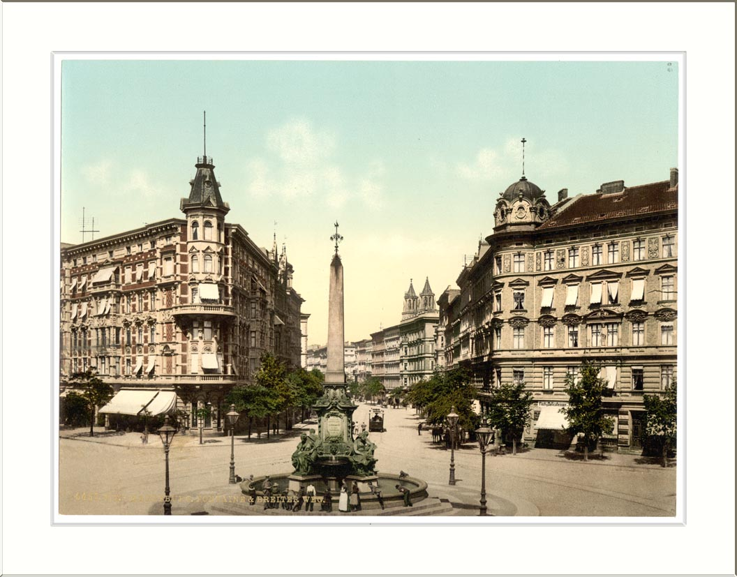 Fountain and Breiter Weg, Magdeburg, Saxony-Anhalt, Germany